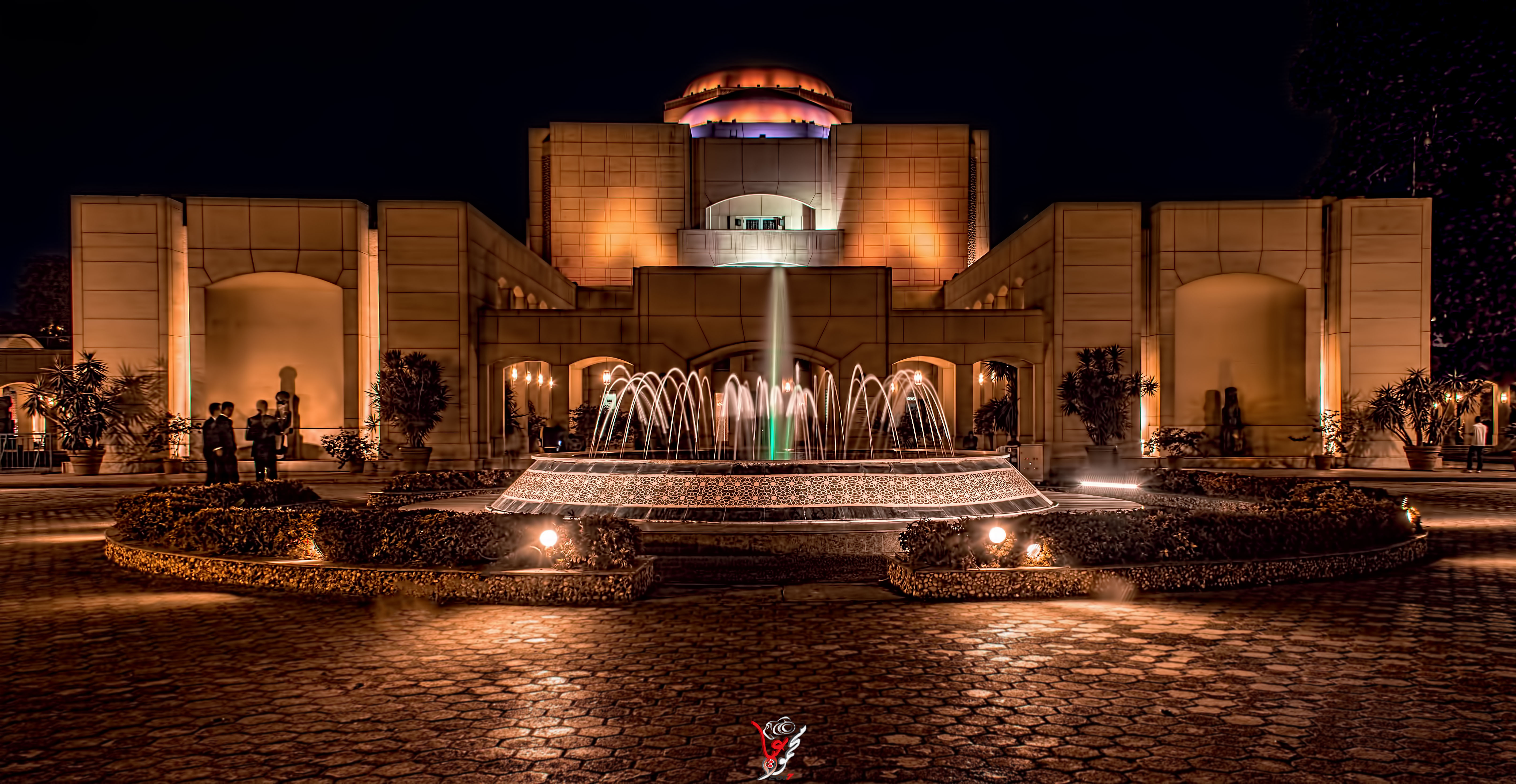 مصرى: مشهد ليلي لدار الاوبرا المصرية